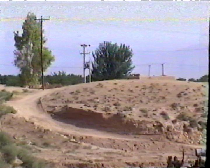 Tol e Nokhodi Kooshkghazi